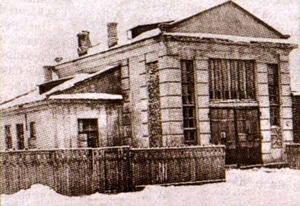 Дом па вуліцы Беламорская, 42. Дом-майстэрня народнага мастака БССР, аднаго з заснавальнікаў беларускай скульптуры Андрэя Ануфрыевіча Бембеля.